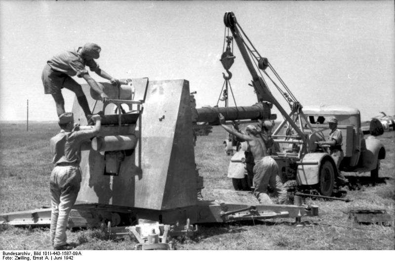 19.6.1942 Rings um den Wüstenflugplatz Geschützrohrwechsel einer 8,8-Flakkanone auf einem afrikanischen Flugplatz. Die einzelnen Arbeiten des Wechsels, Ausziehen des Rohres, Aufhängen des Geschützrohres, Einführen desselben und Fertigstellen